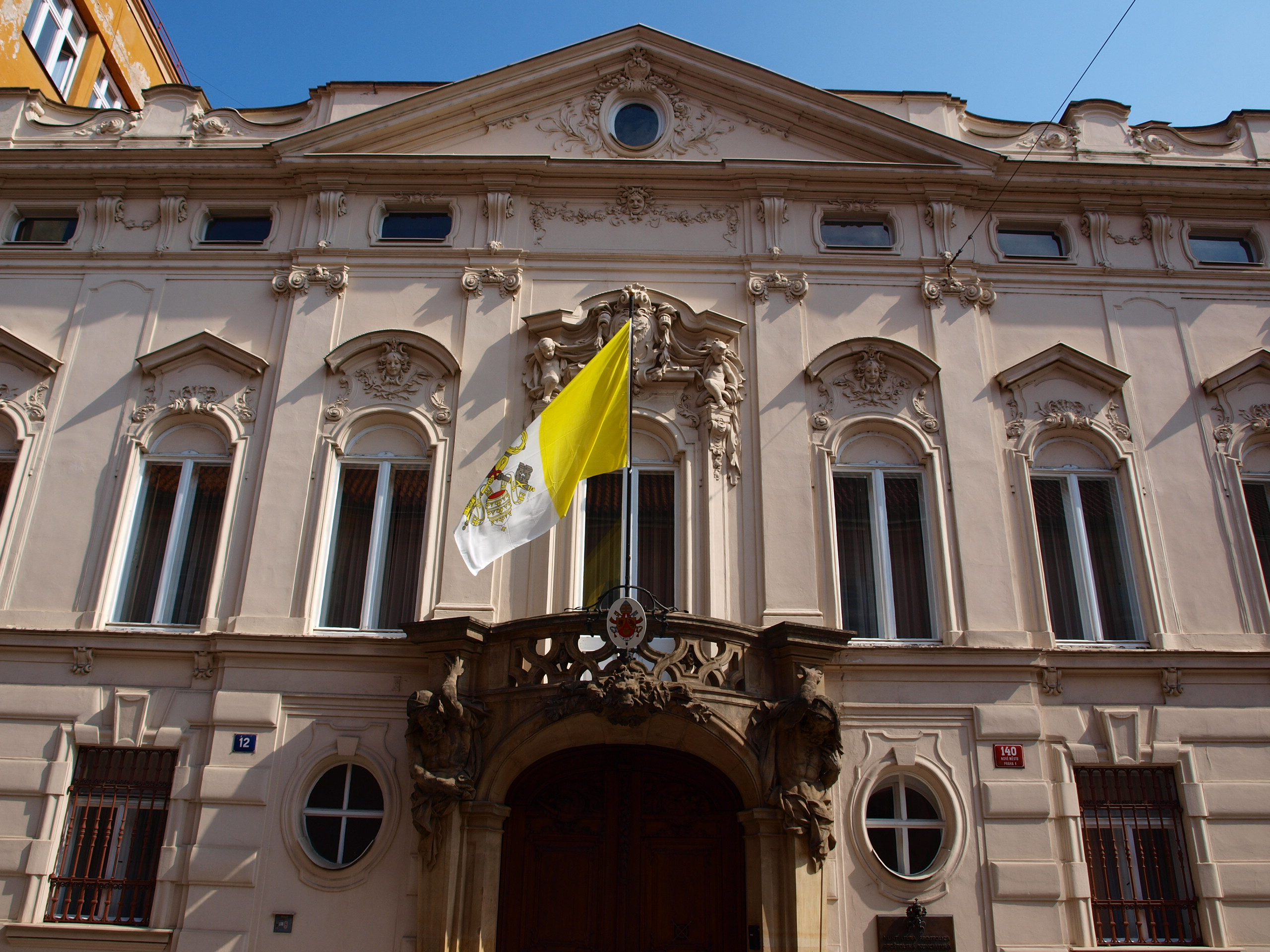 Ditrichštejnský palác Praha